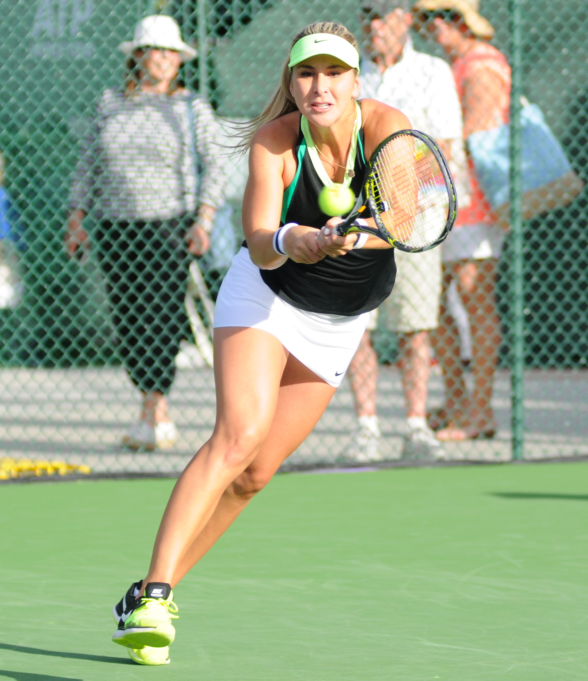 2017 BNP Paribas Open